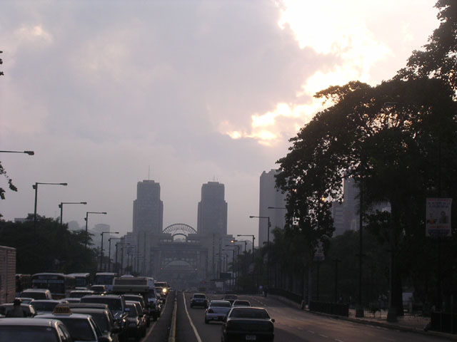 Torres del Silencio Center Simón Bolívar and the Silencio Towers, from ja, Link